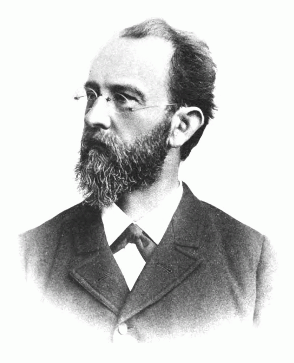 Gustav von Hüfner (1840-1908), German biochemist